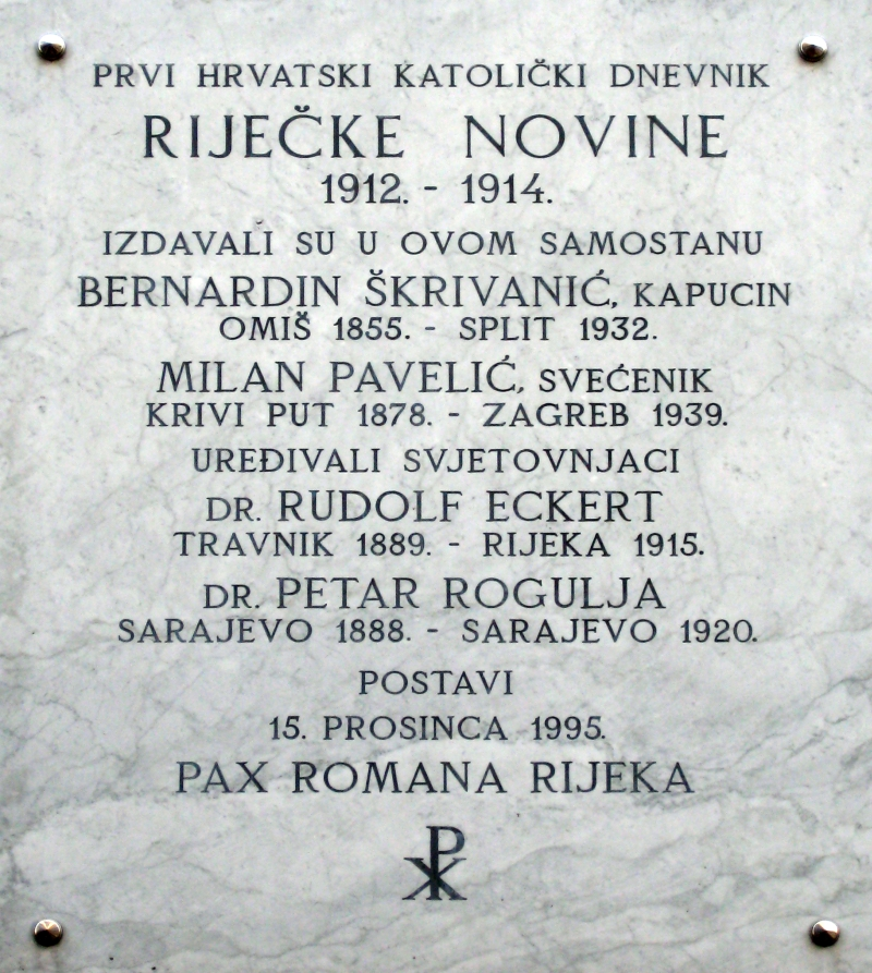 spomen ploča na katolički dnevnik, Riječke novine na crkvi Gospe Lurdske, Rijeka